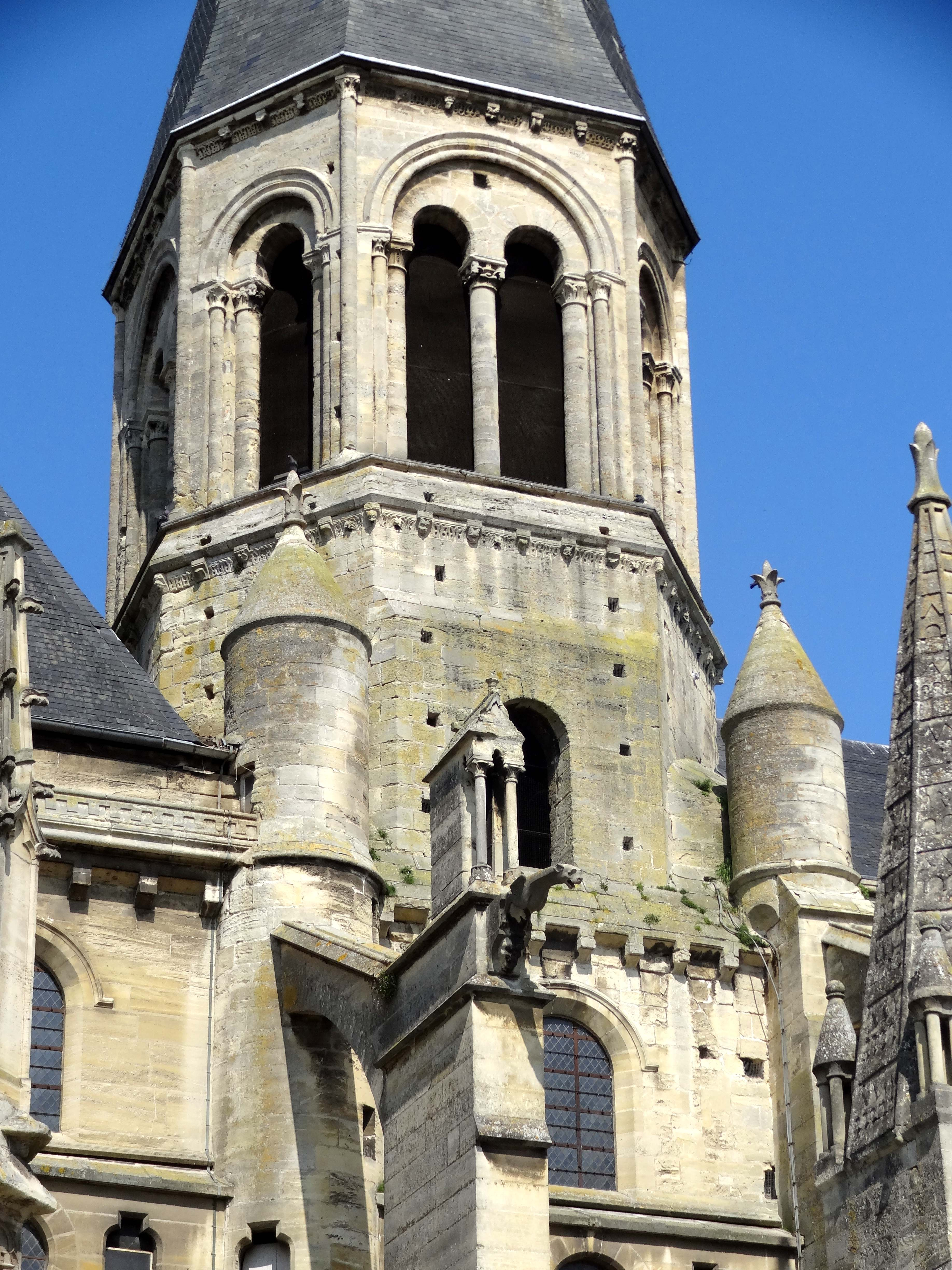 Collégiale Notre-Dame de Poissy - voir titre.